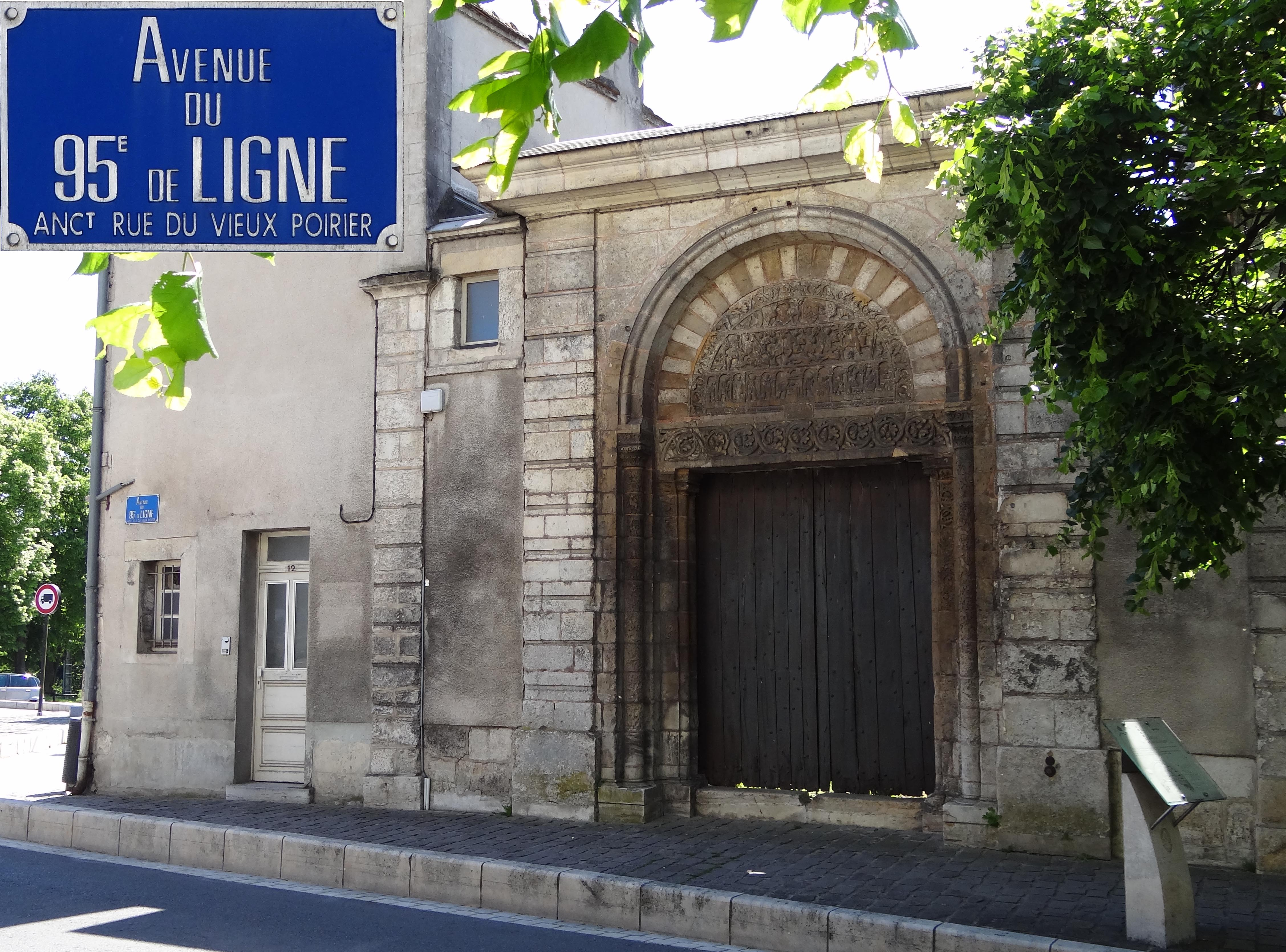 Avenue du 95e de ligne à Bourges. Anciennement avenue du vieux Poirier